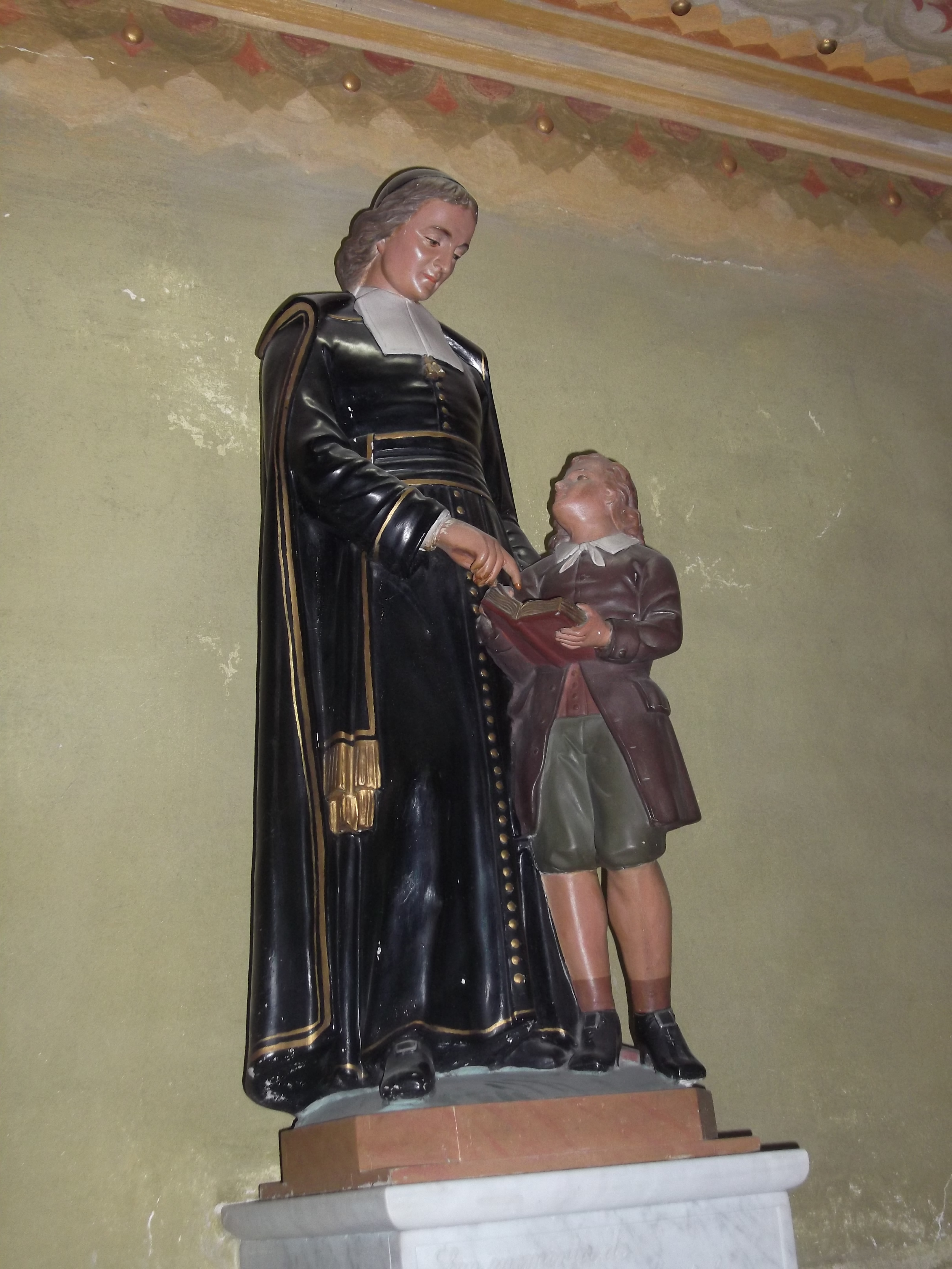 Catedral de Pelotas